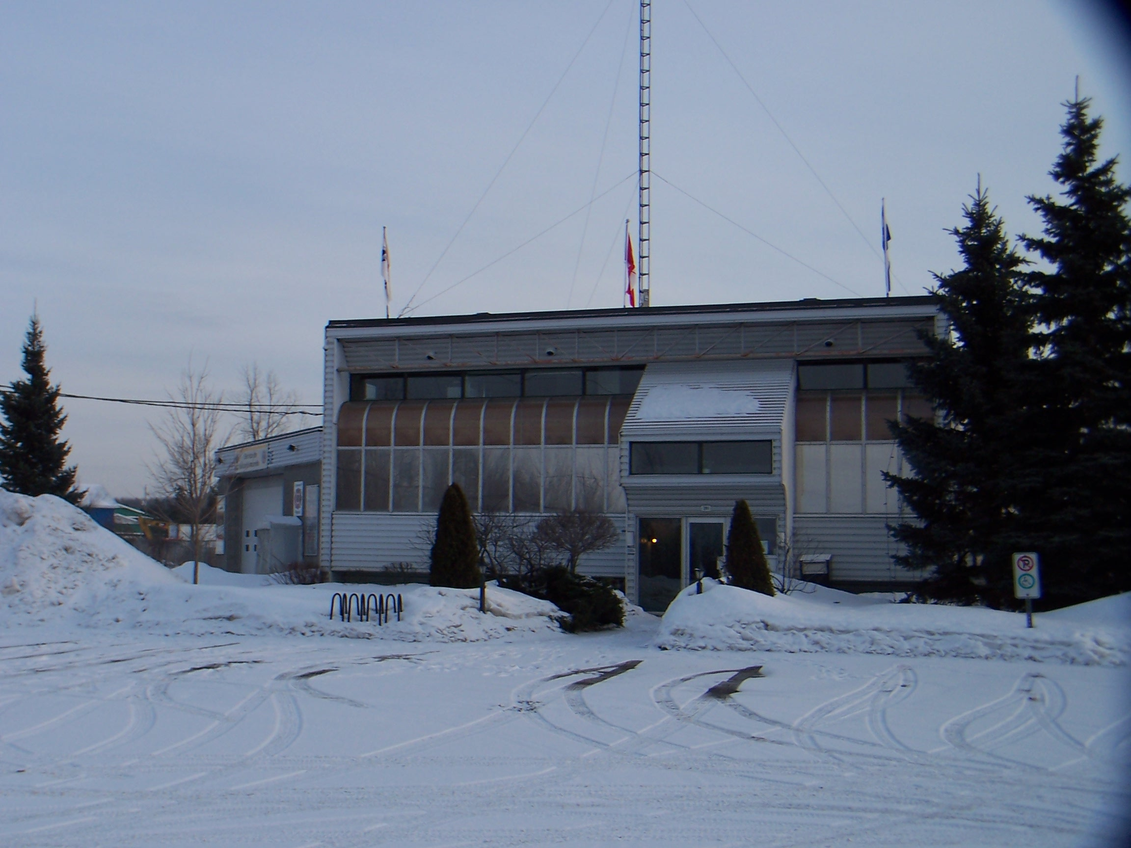 Mairie 2013